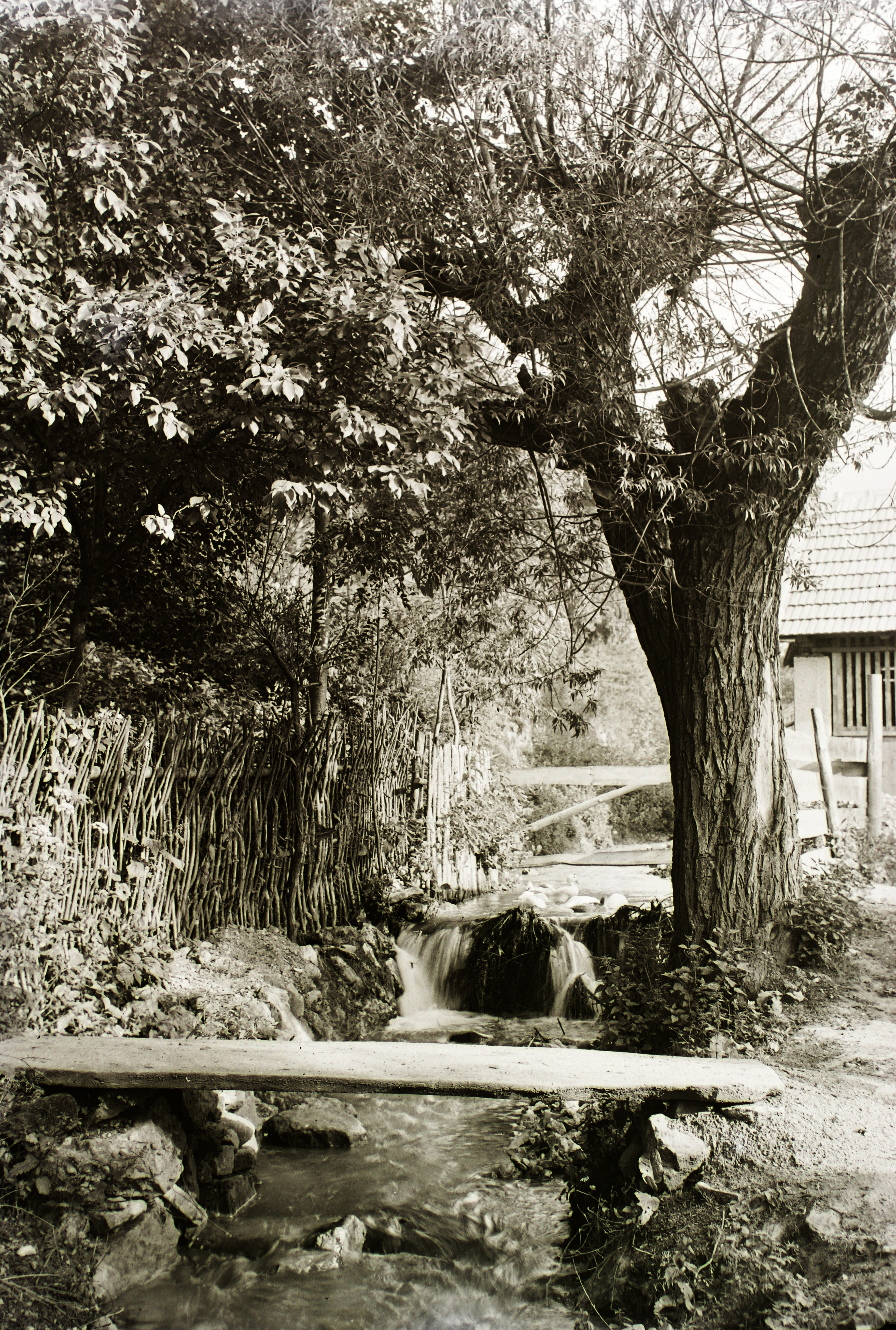 Location: Slovakia, Turík Tags: Czechoslovakia